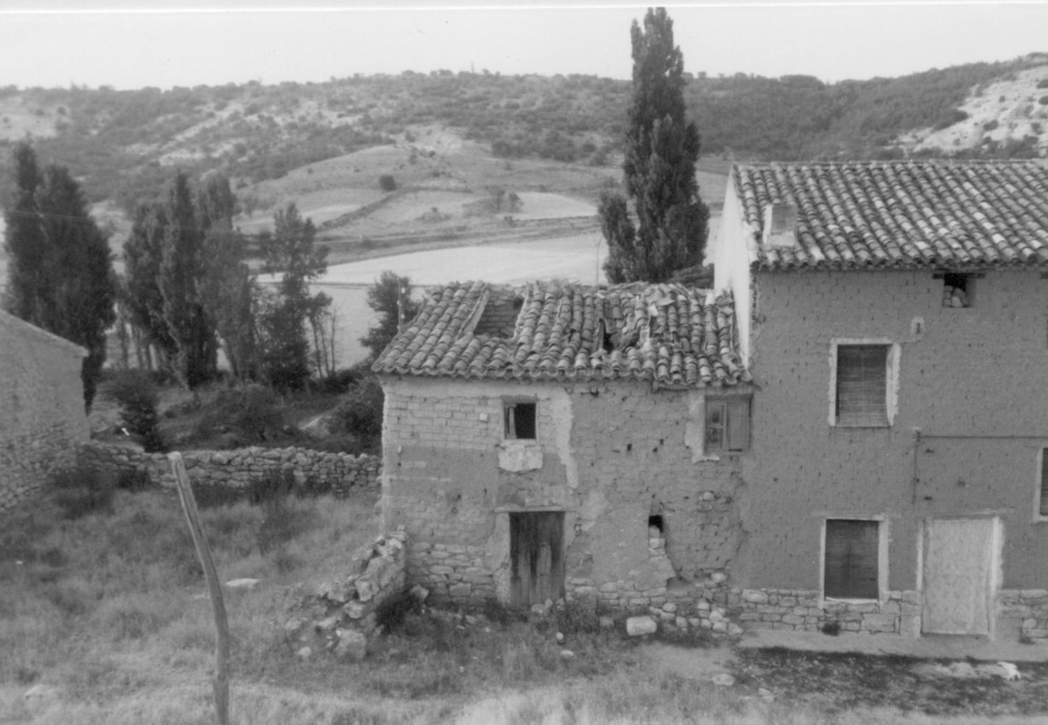 Casas de adobe. (1985)